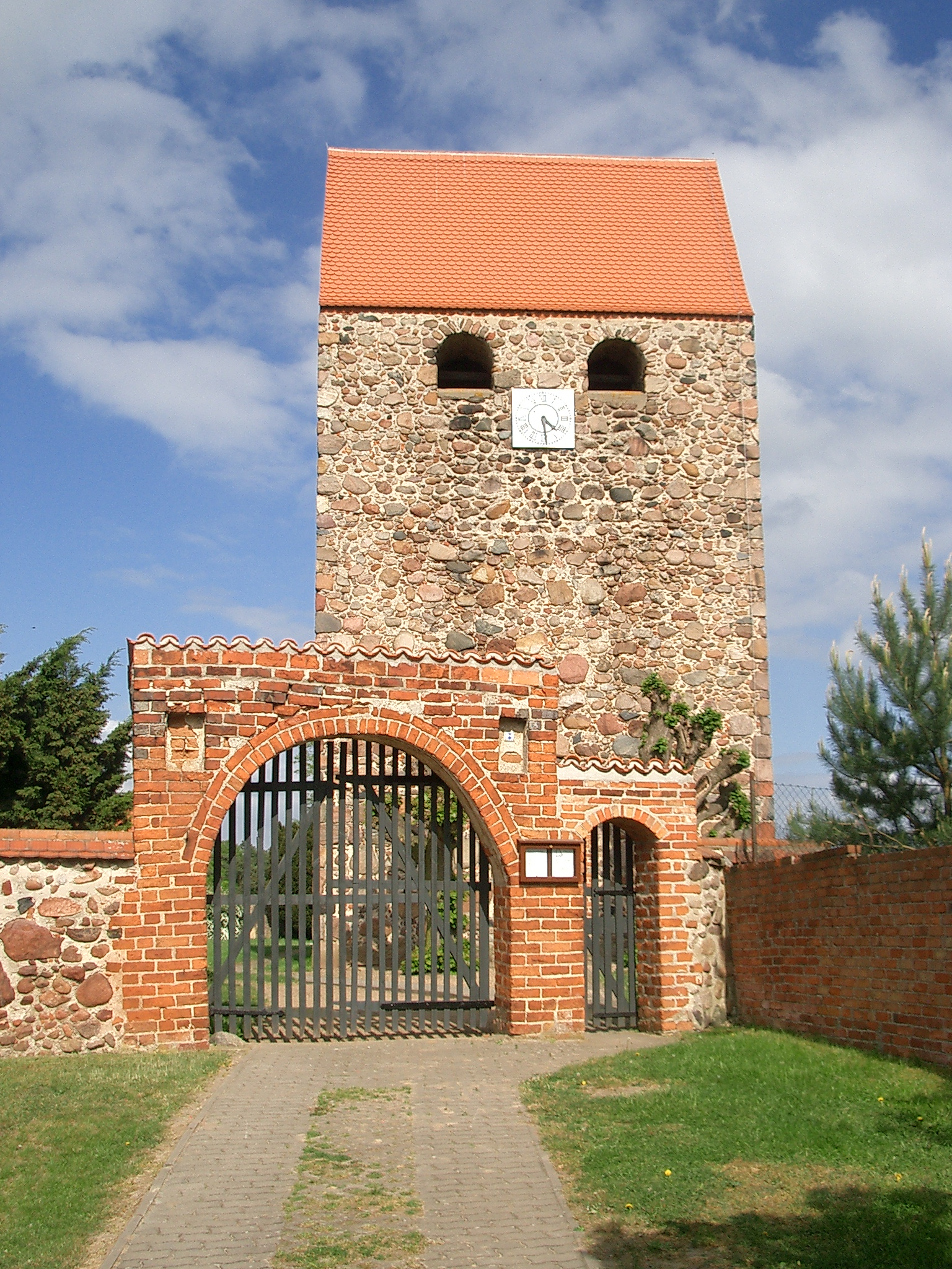 Dorfkirche in Schernikau, Sachsen-Anhalt, Deutschland.